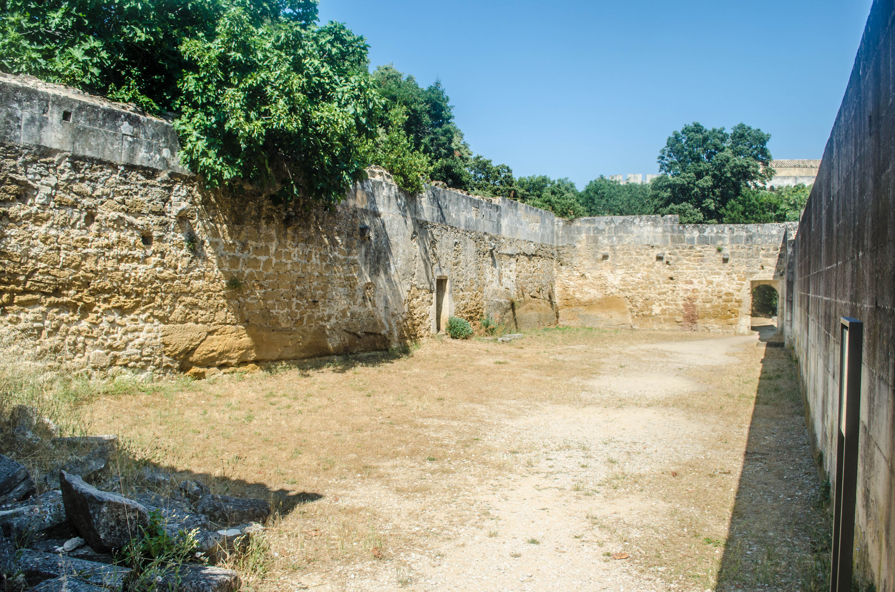 Château de Suze-la-Rousse (Drôme, Rhône-Alpes, France). Salle du jeu de paume.